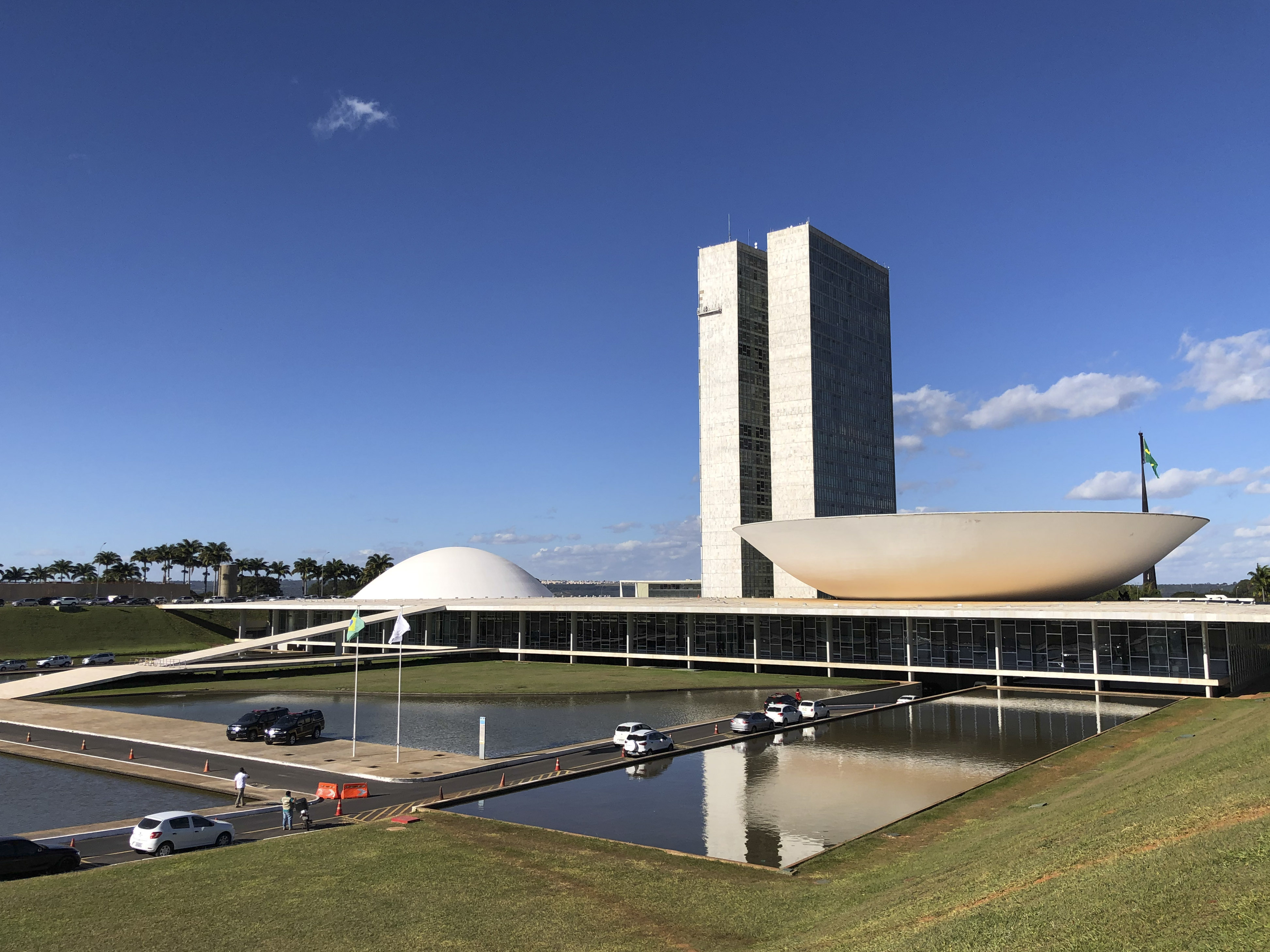 Fachada do Congresso Nacional, a sede das duas Casas do Poder Legislativo brasileiro. As cúpulas abrigam os plenários da Câmara dos Deputados (côncava) e do Senado Federal (convexa), enquanto que nas duas torres - as mais altas de Brasília, com 100 metros - funcionam as áreas administrativas e técnicas que dão suporte ao trabalho legislativo diário das duas instituições. Obra do arquiteto Oscar Niemeyer. Foto: Leonardo Sá/Agência Senado